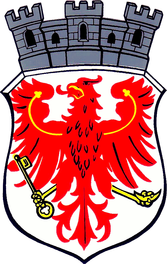 Wappen der Stadt Beelitz